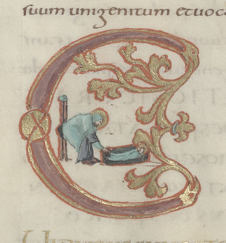 Évangiles dits de Drogon Initiale historiée Nativité